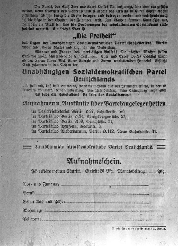 An das werktätige Volk Gross-Berlins! [Rückseite von B 145 Bild-P050139]